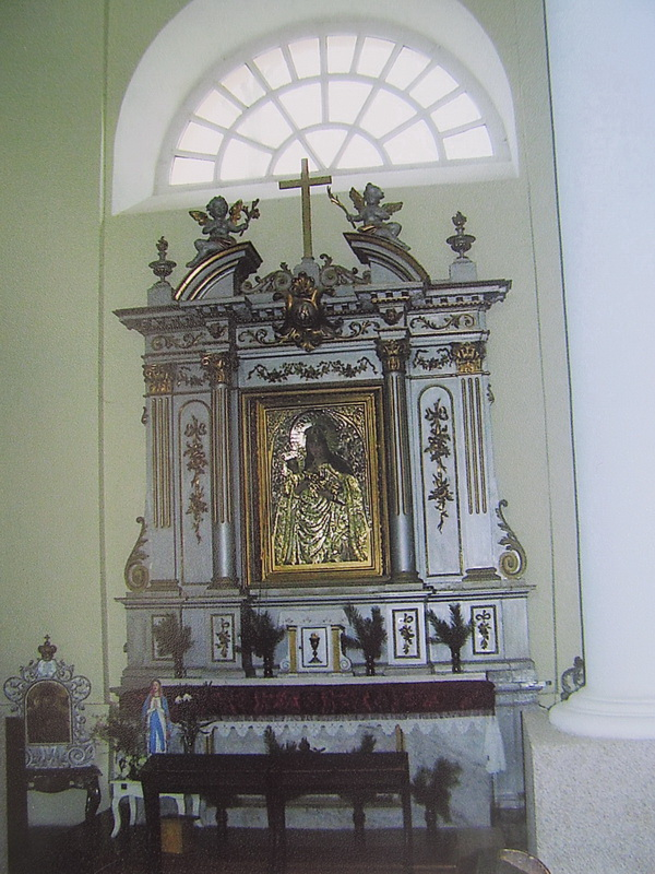 Рось. Касцёл